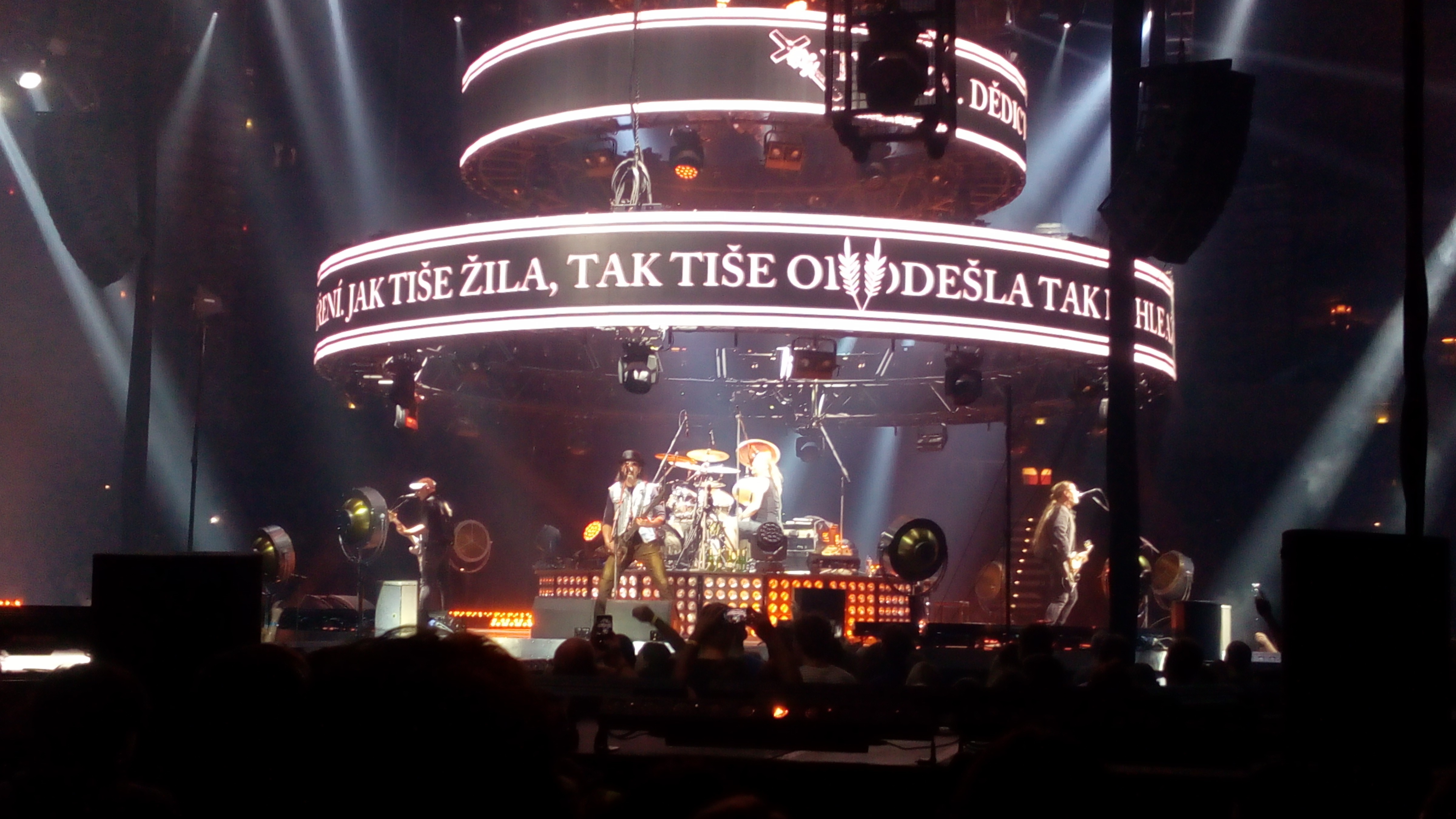 Skupina Kabát během vyprodaného koncertu v pražské O2 areně 28. 11. 2017